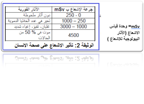 تأثير الإشعاع على صحة الإنسان